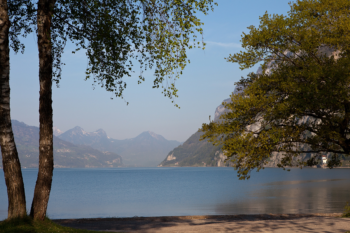 Seeufer beim Bootshafen in Walenstadt